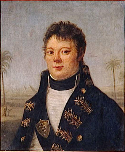 Médecin Nicolas-Rene Dufriche Desgenettes